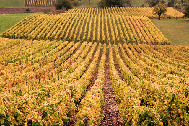 Les vignes en automne